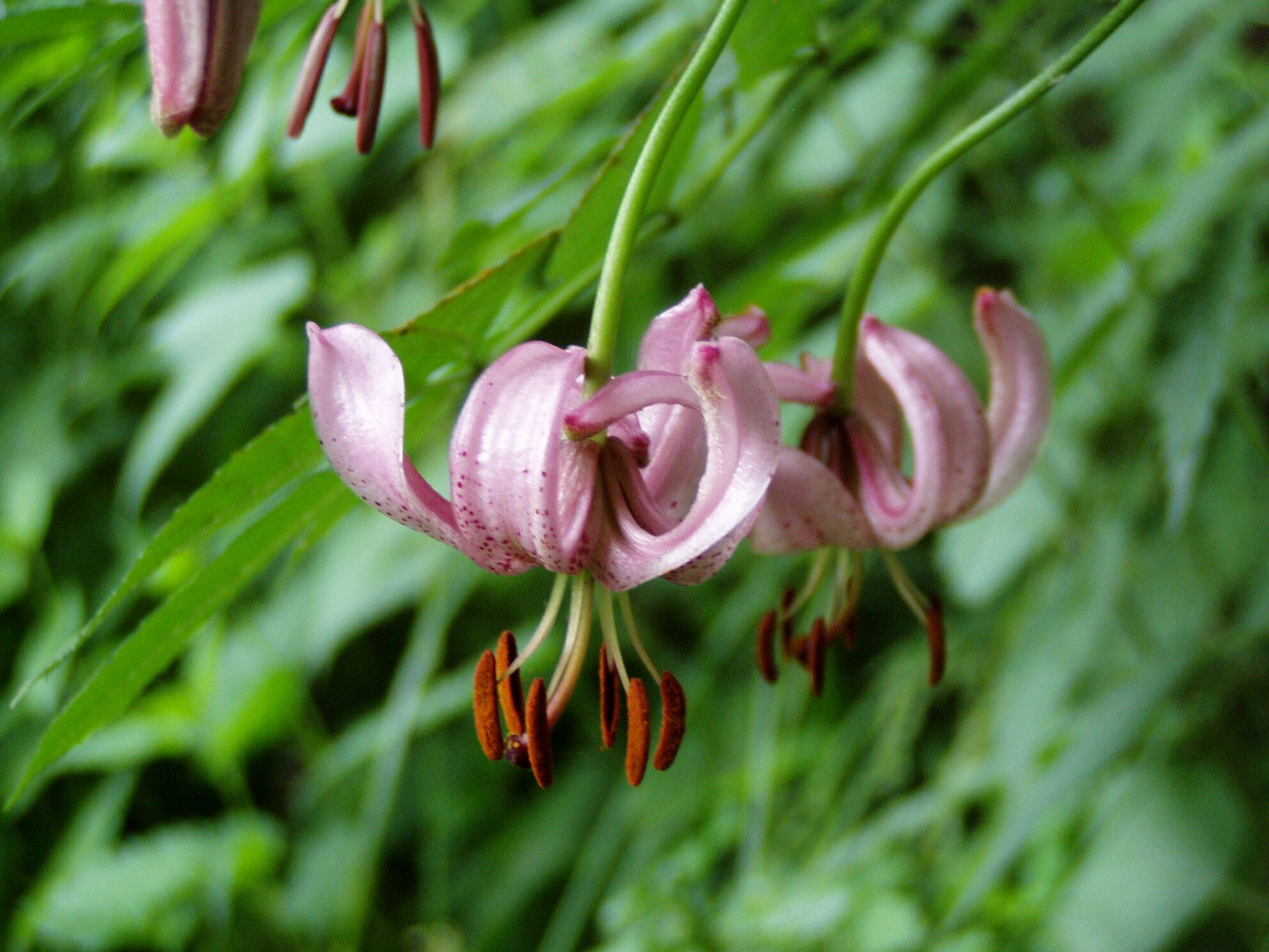 Lilium martagon, Rastbühel, Hart bei Graz, Styria, Austria